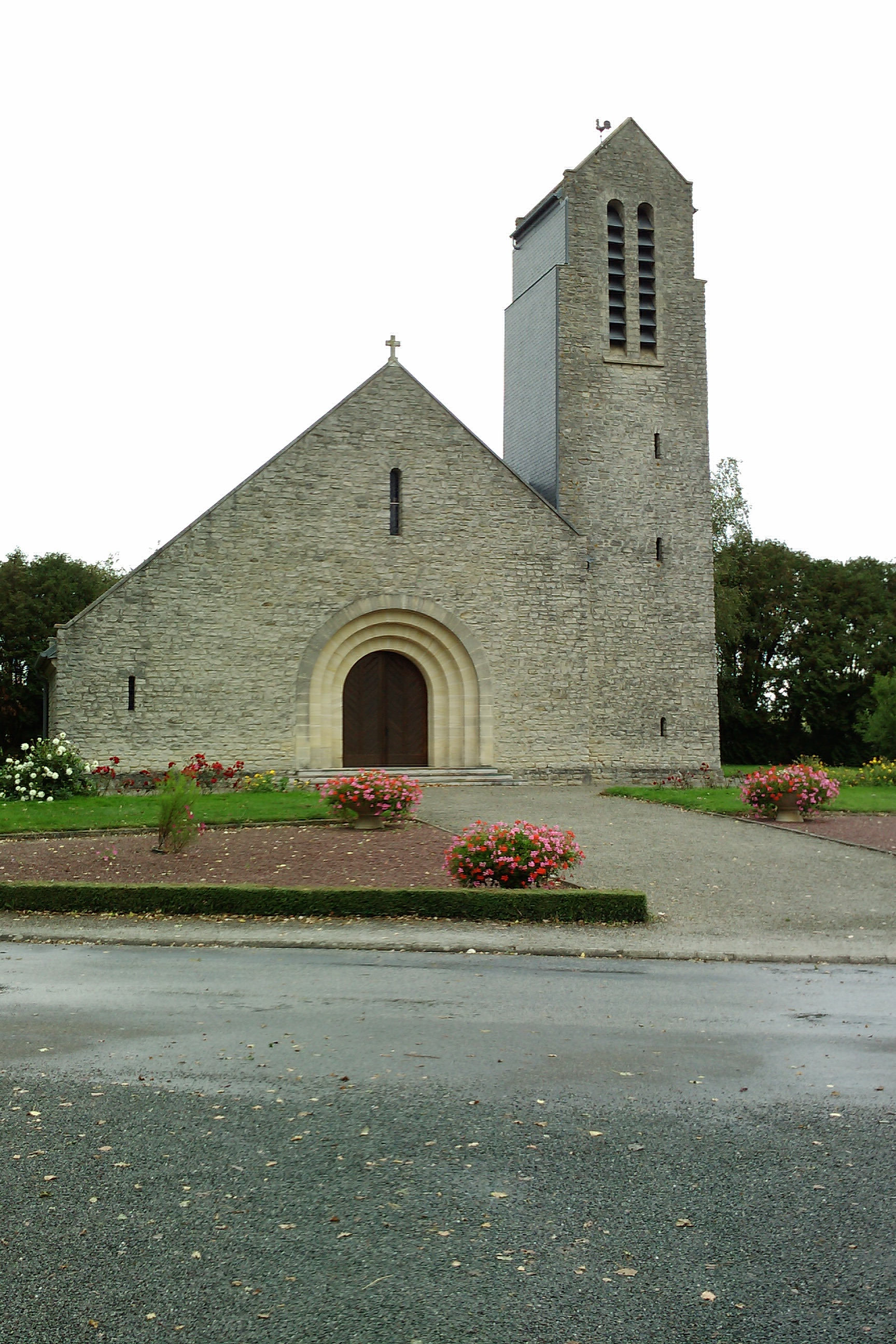 Nouvelle église de Saint-Sauveur-de-Pierrepont